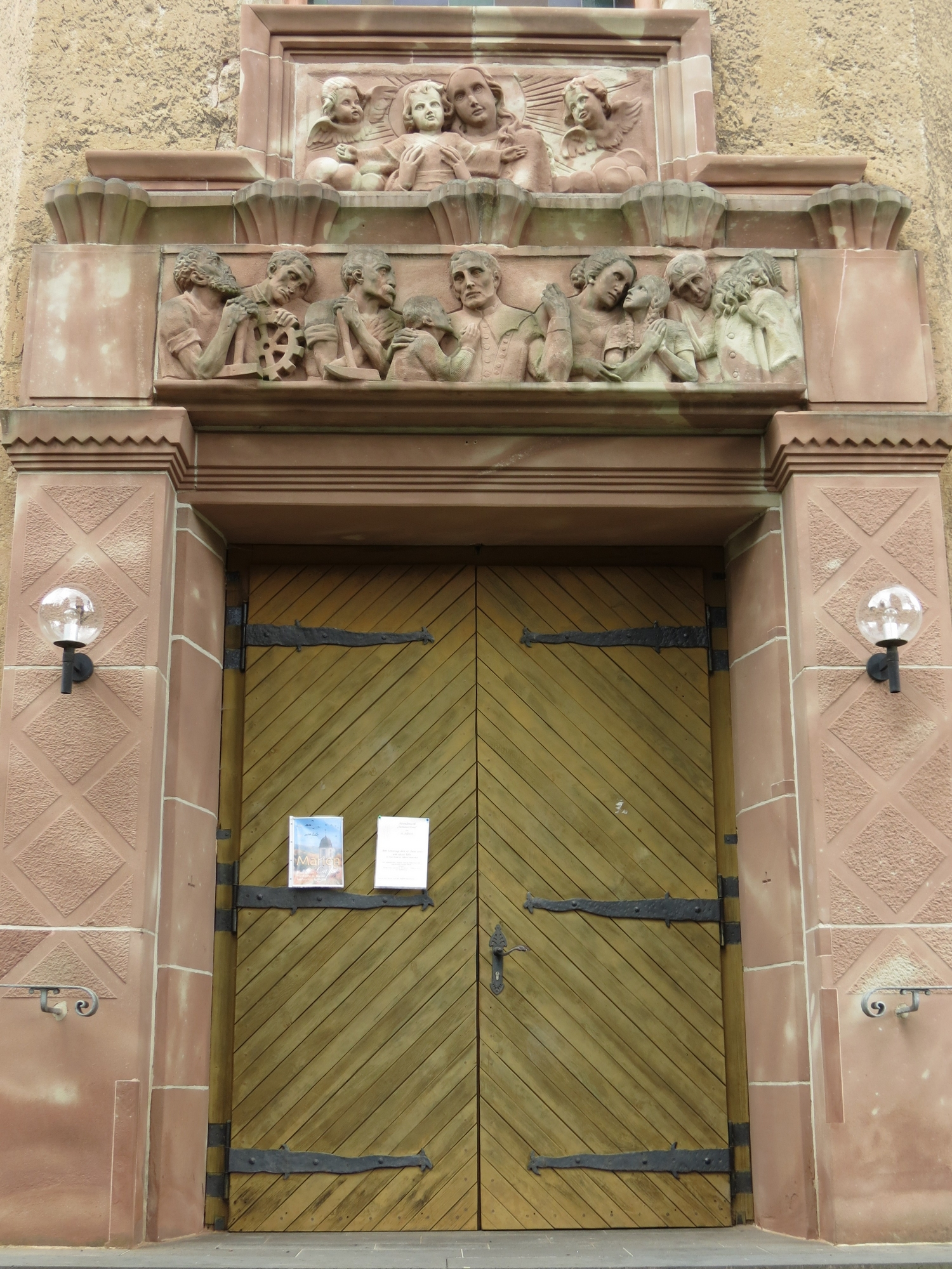 Das Portal der kath. Pfarrkirche St. Marien, Fischbachstr. 93, Rußhütte, Saarbrücken.